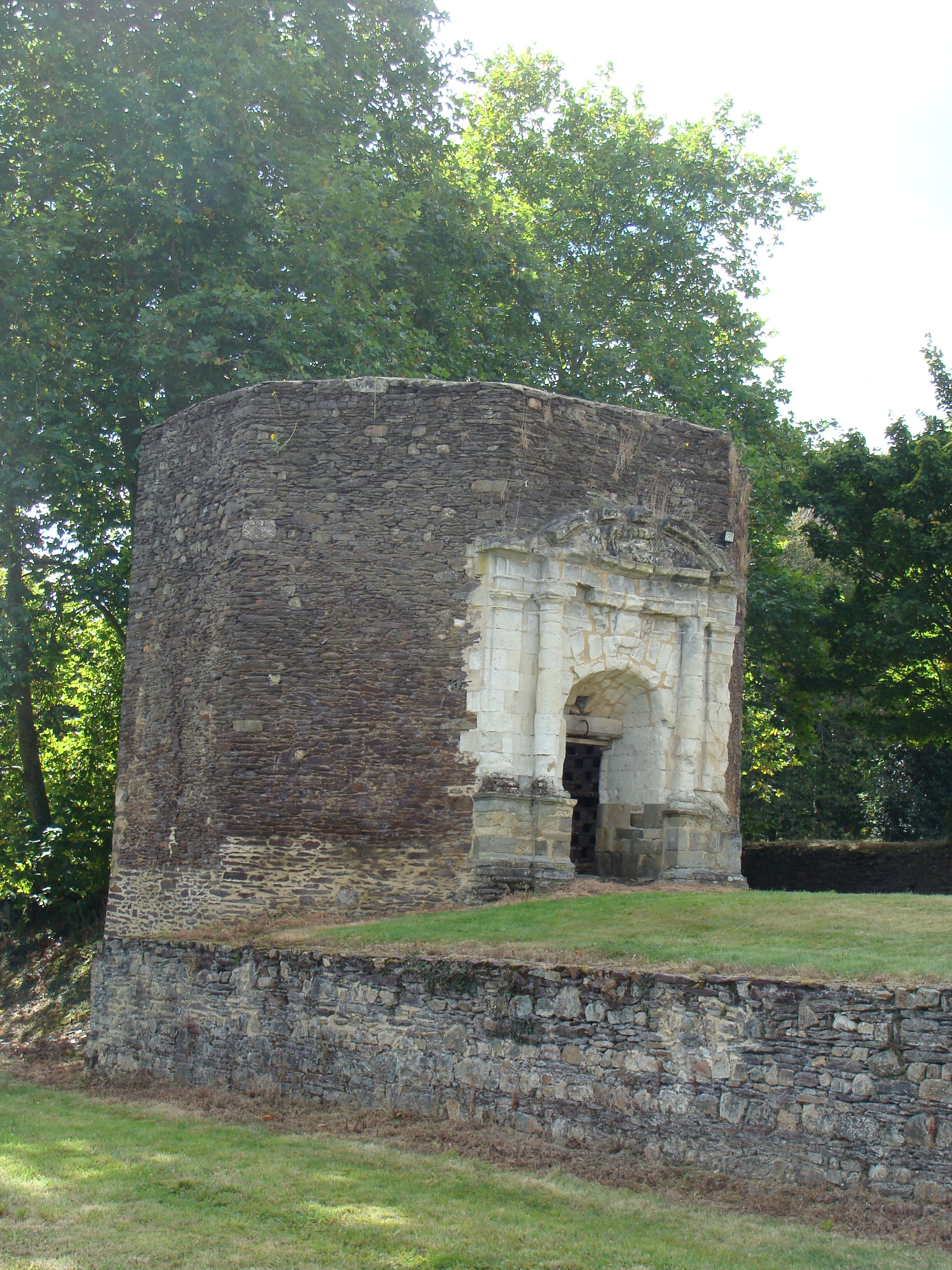 Château de Coëtbo, Coëtbo (Classé, 1993) .